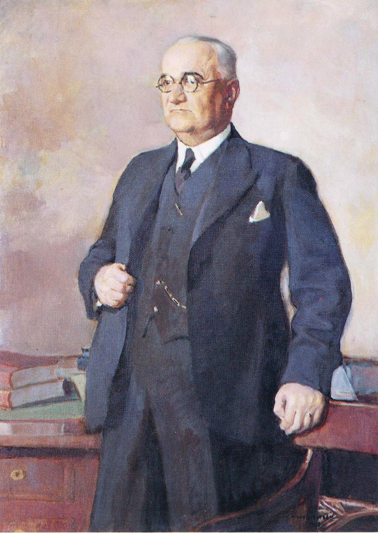 Prosessioikeuden professori Bertil Sjöström (1879–1945). Muotokuva kuuluu Helsingin yliopiston kokoelmiin.